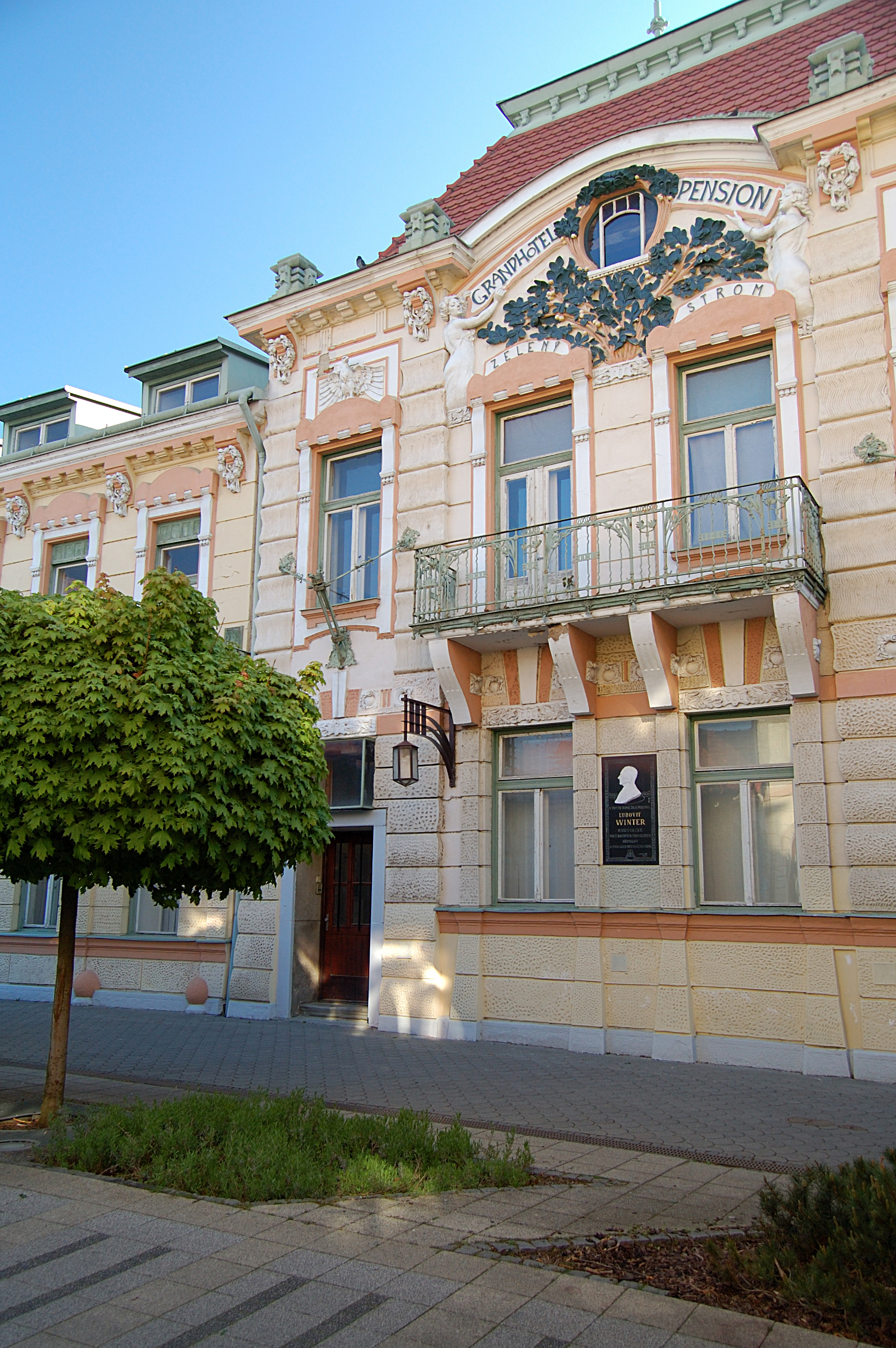 Detska liecebna Zeleny strom